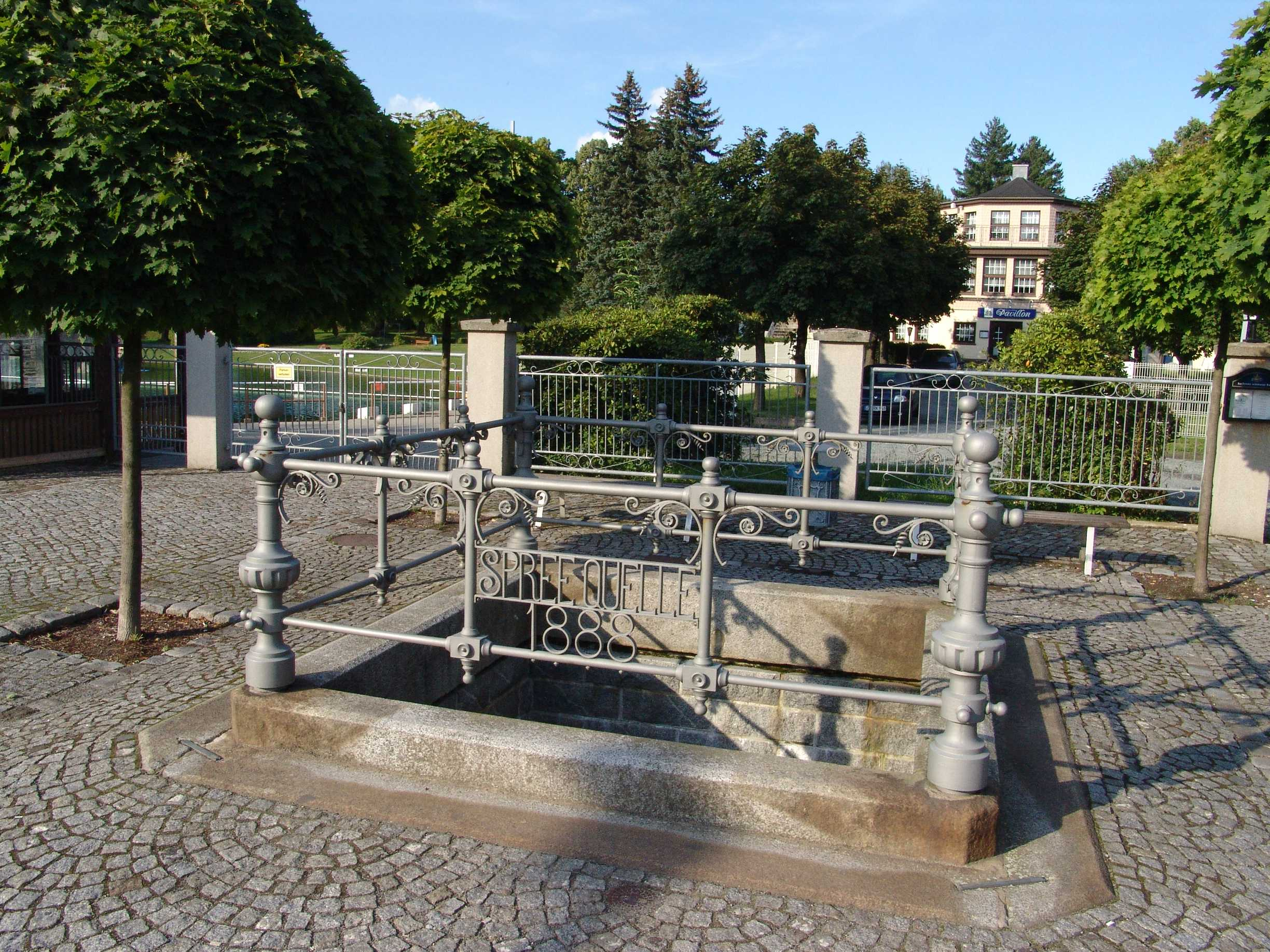 Spreequelle in Neugersdorf, Landkreis Görlitz, Sachsen